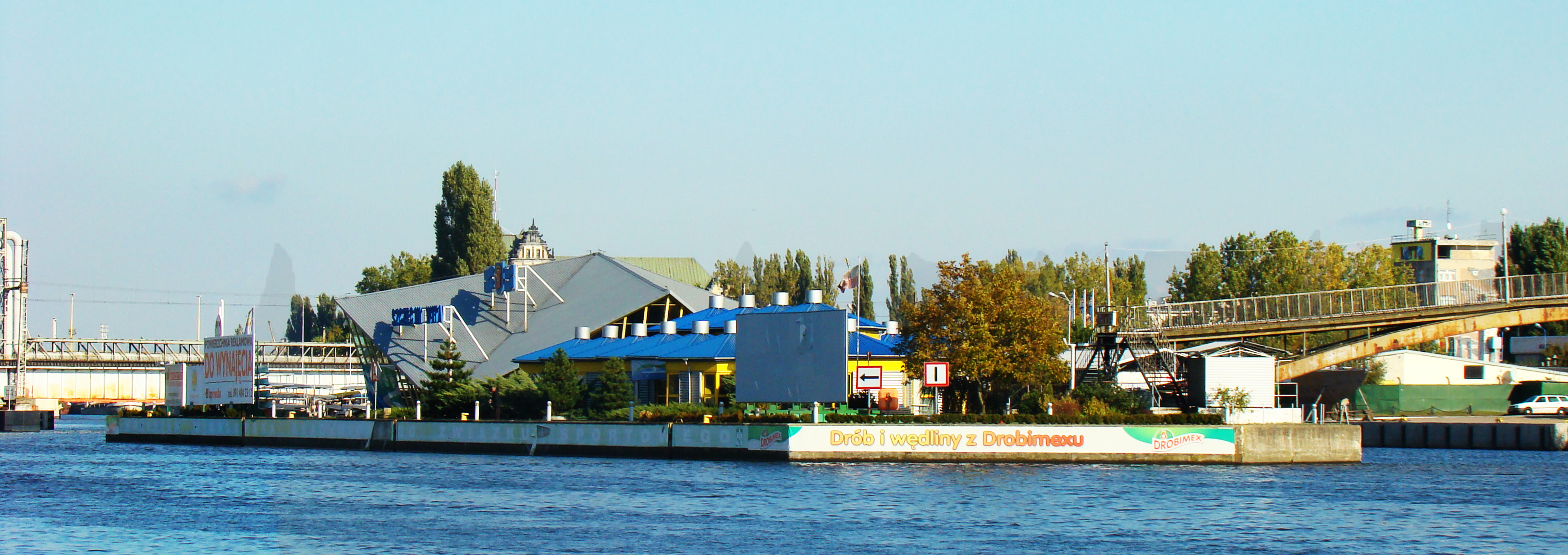 Wyspa Przymoście, Szczecin, Polska